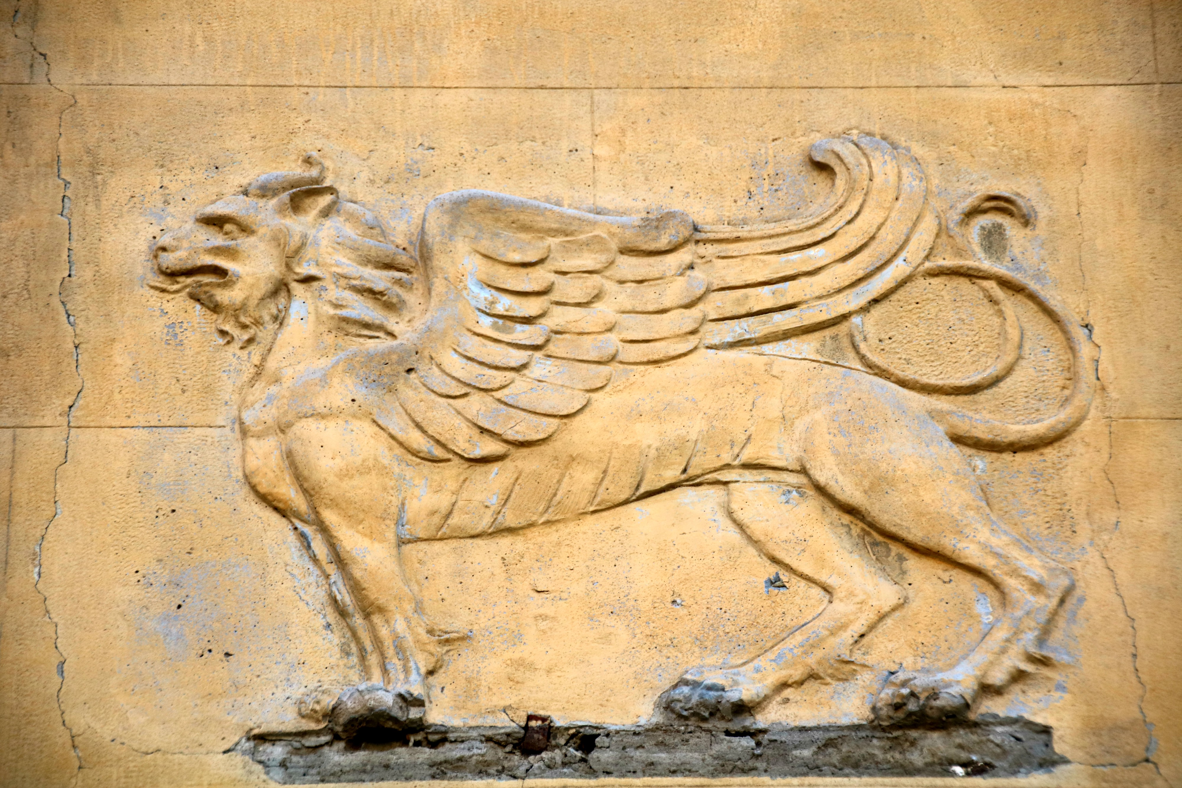 Sezione di Archivio di Stato di Pescia This is a photo of a monument which is part of cultural heritage of Italy.